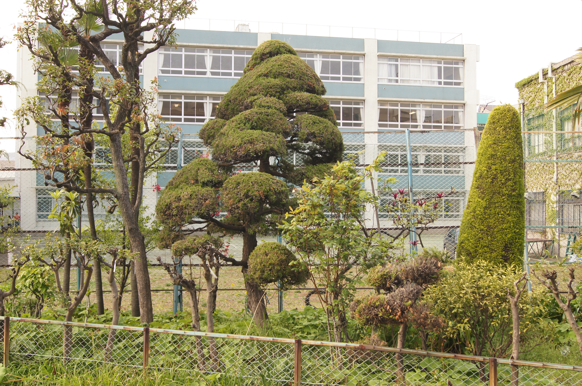 成女中学・高等学校の運動場・建物を、靖国通りにかかった歩道橋の上から撮影。生徒が使用する出入り口はこの大通りには面していない。